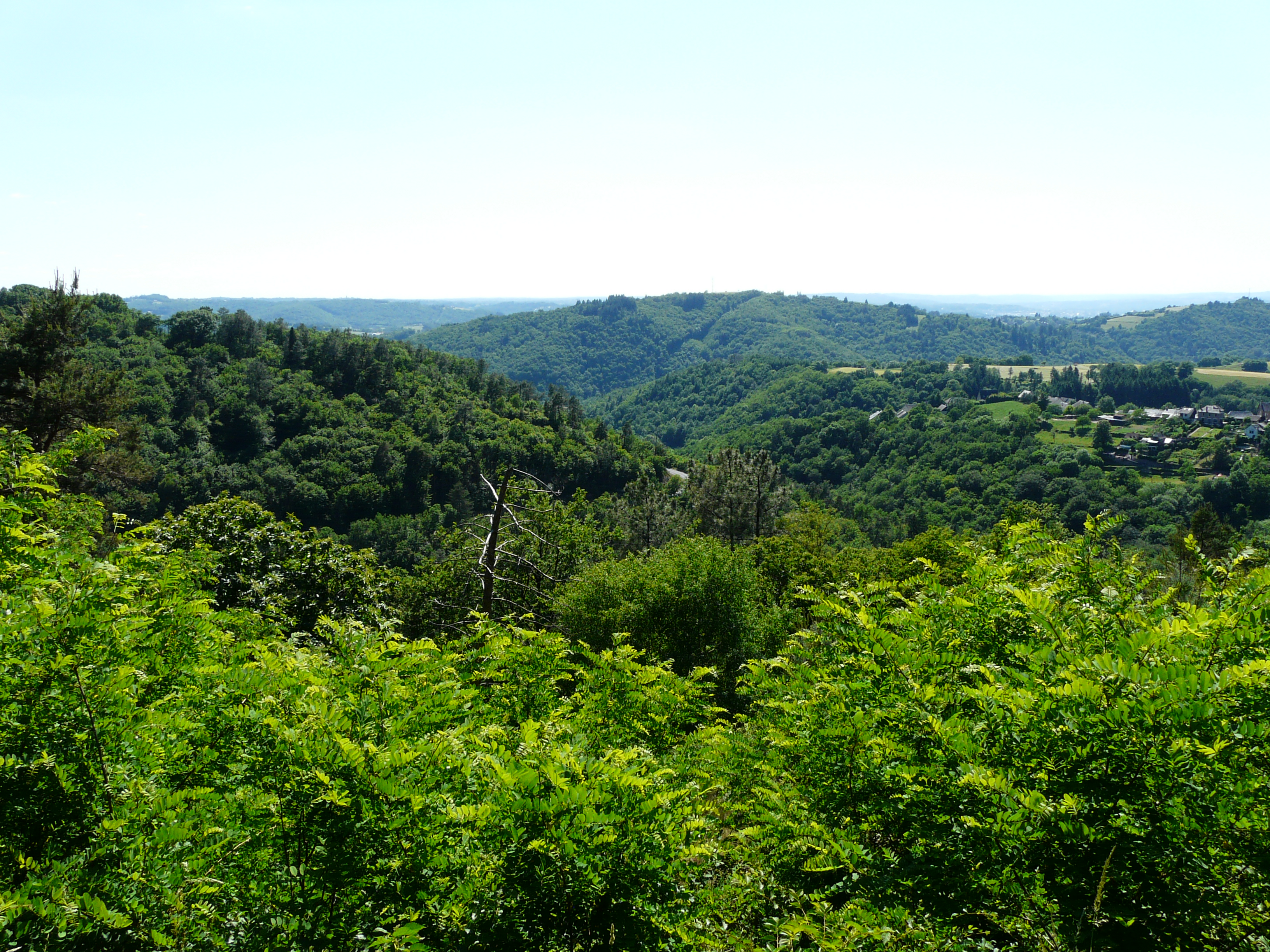 Les gorges du Coiroux séparent Palazinges (à gauche) des maisons du bourg d'Aubazine, Corrèze, France